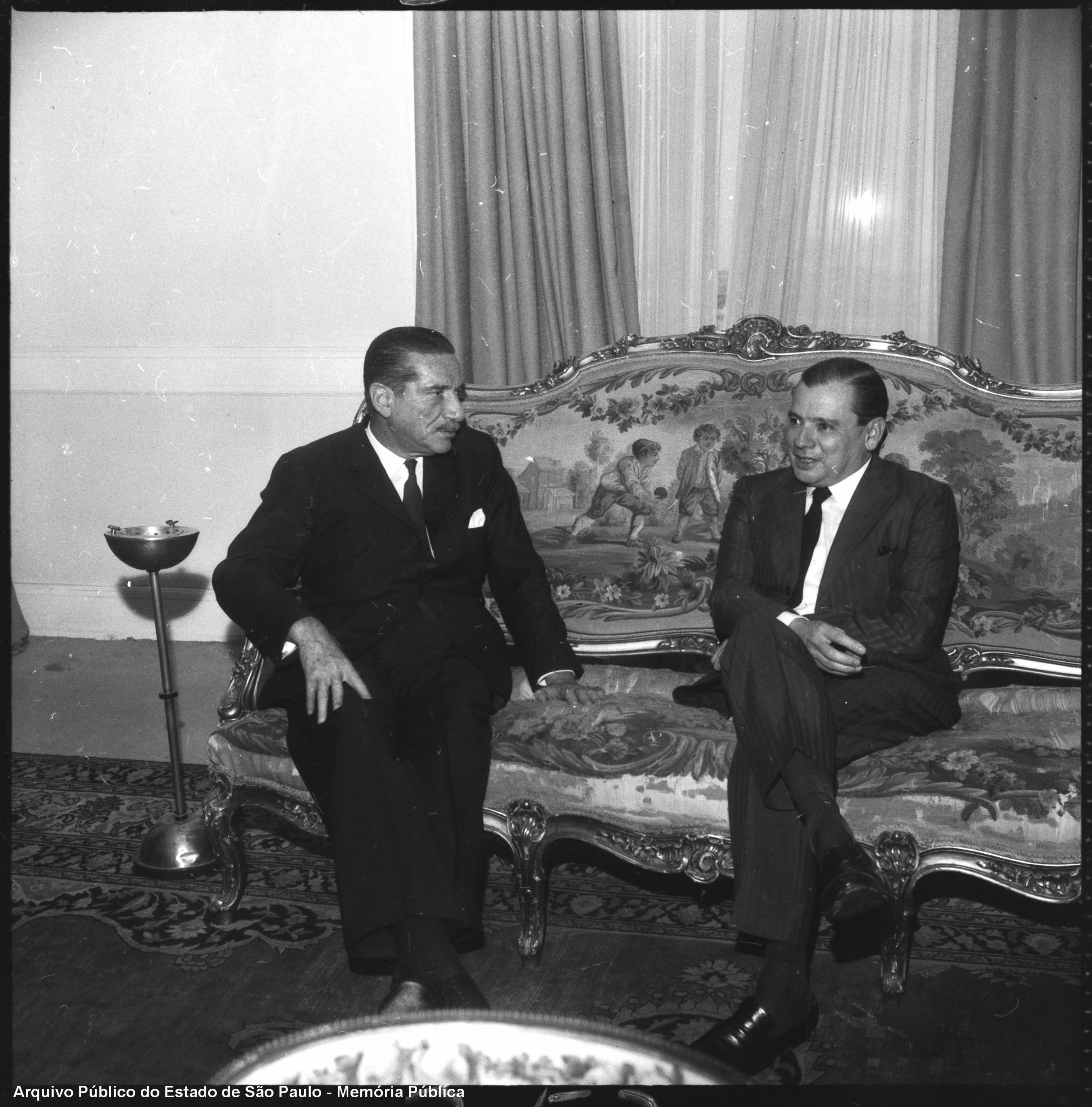 O embaixador da Argentina Mario Amadeo visita o governador do estado de São Paulo Abreu Sodré. Imagem do acervo iconográfico do Arquivo Público do Estado de São Paulo, código BR_APESP_SEGOV_ICO_NEG_1377.